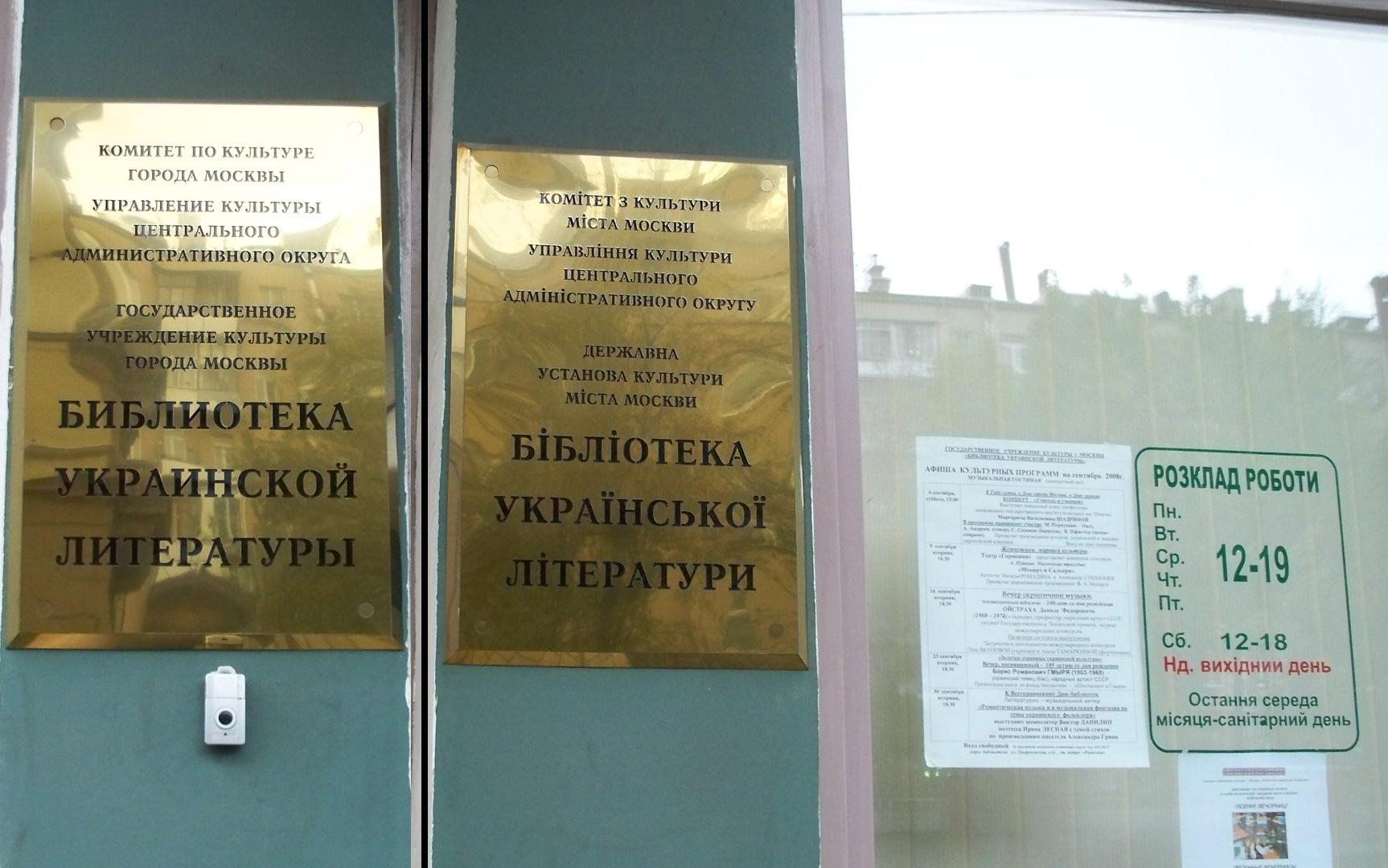 Библиотека украинской литературы в Москве. Вывеска на русском языке (слева), на украинском языке (по центру), расписание работы на украинском языке (справа)